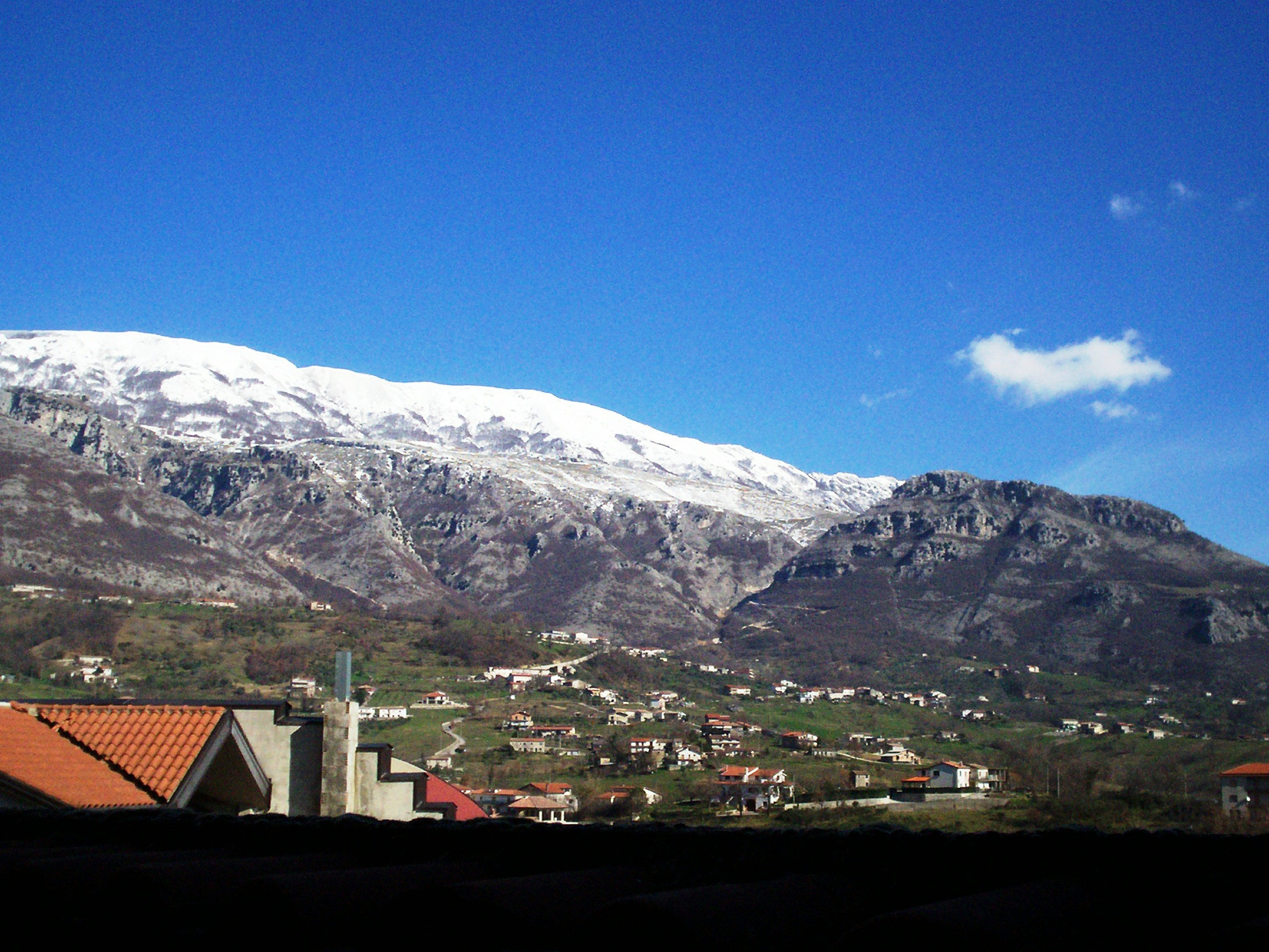 particolare della catena montuosa del Matese vista da Cusano Mutri (Bn)